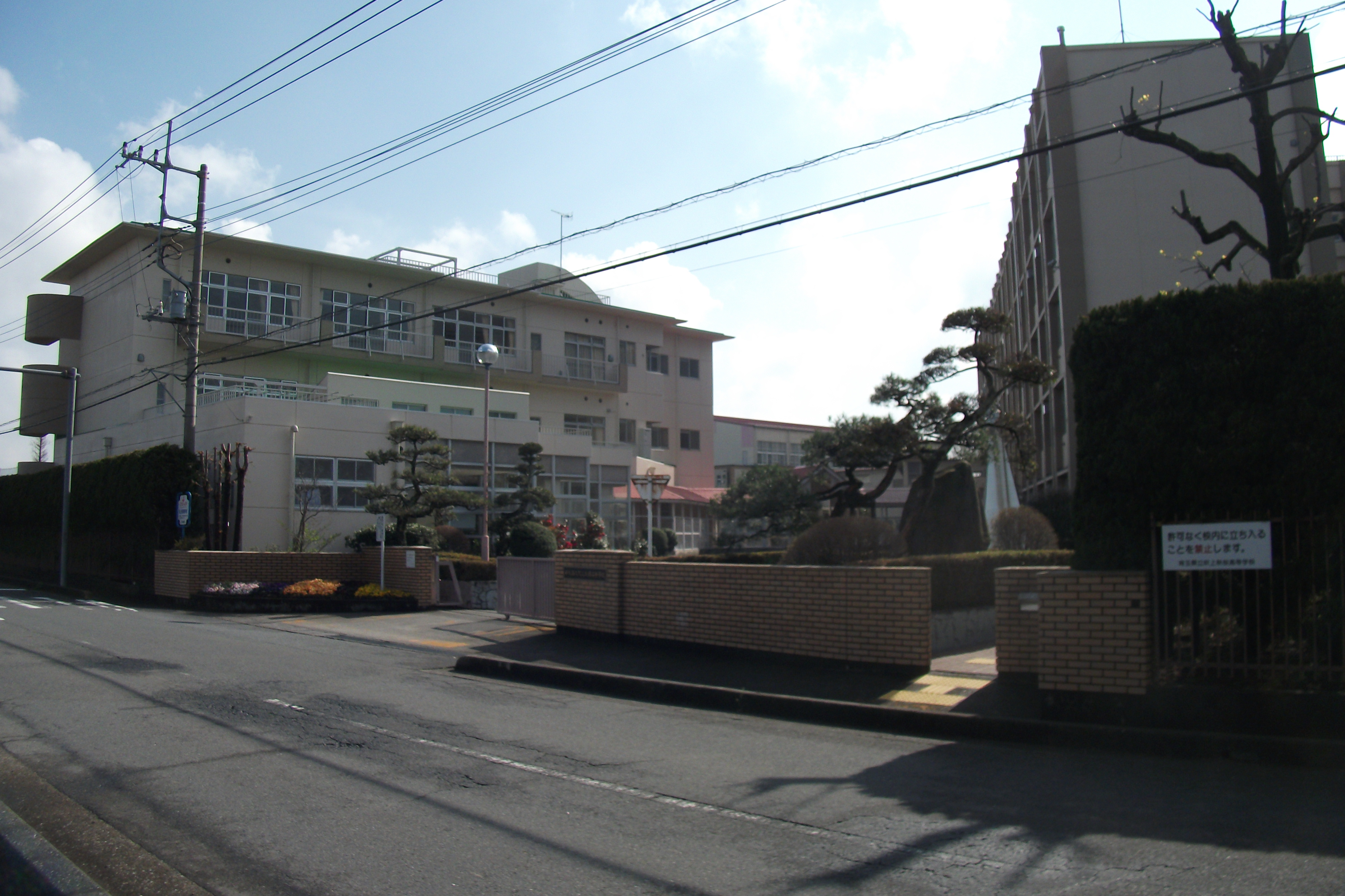 埼玉県立吹上秋桜高等学校